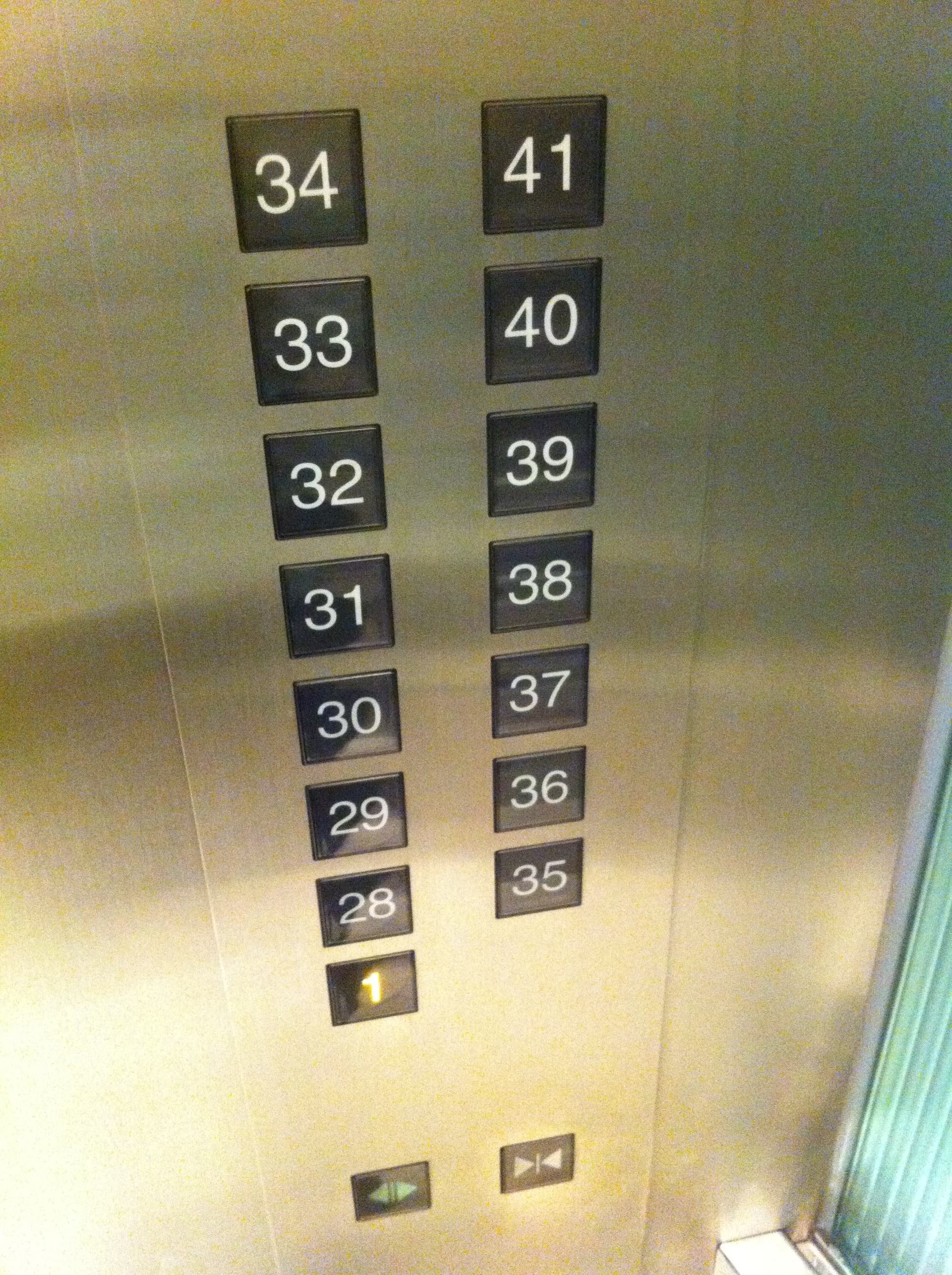 中文（香港）: 中環zh:新世界大廈